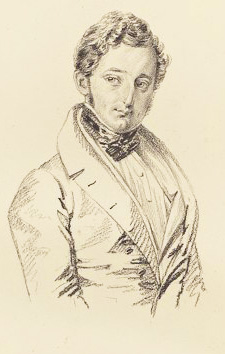 Bohnstedt, Teodor Ludvig (1809-1888)